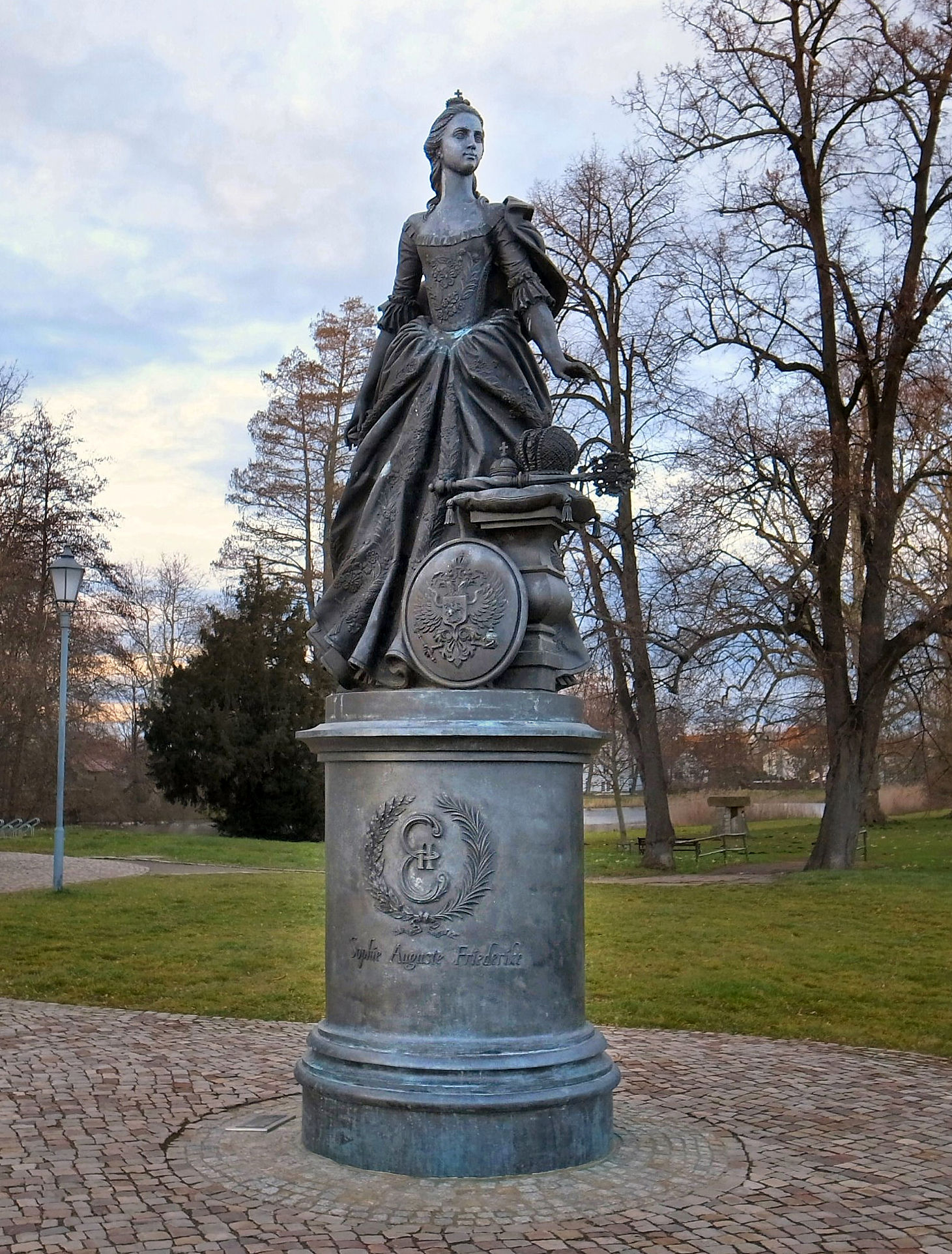 Zerbst/Anhalt, Denkmal für Prinzessin Sophie Auguste Friederike von Anhalt-Zerbst, Katharina II. (Russland), Katharina die Große